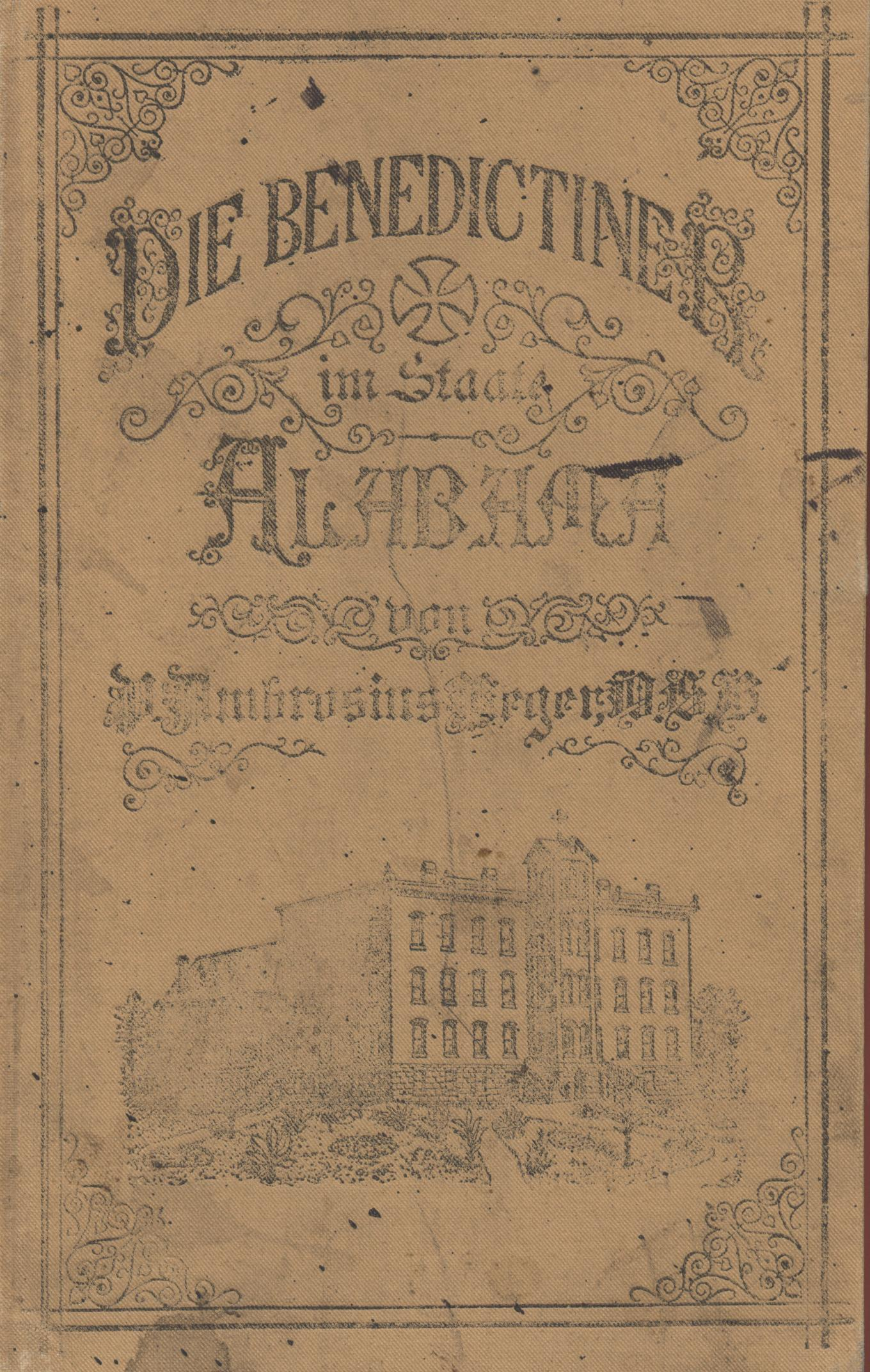 Buchcover über die Benediktiner in Alabama, mit detailierten Angaben über Abt Benedikt Menges, Obermohr, Cullman